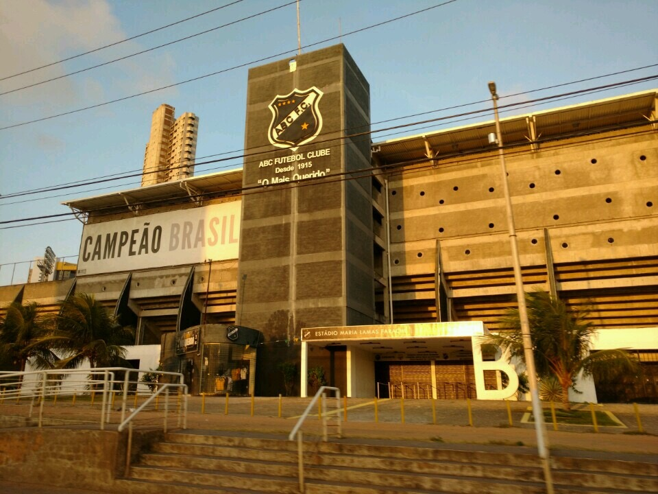 Frente do Estadio de futebol ABC